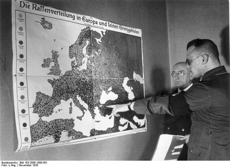 Reichsstelle für Sippenforschung Der Leiter der Dienststelle, SS-Hauptsturmführer Dr. Mayer [Kurt], bespricht mit seinem Stellvertreter Herrn Wasmannsdorff einen Sonderfall. 49-35